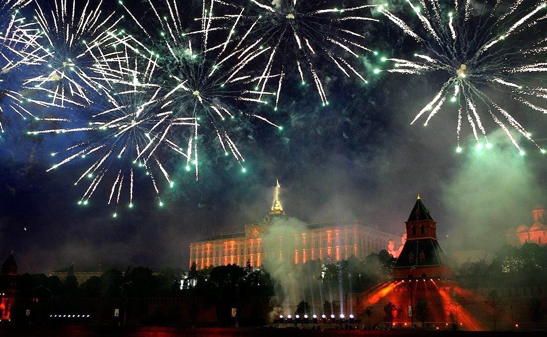 Праздничный салют в честь 65-летия Победы в Великой Отечественной войне.